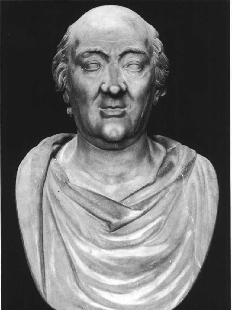 Busto di Carolo Goldoni, opera di Angelo Giordani precedente al 1847. Il busto fa parte del Panteon Veneto, conservato presso Palazzo Loredan di Campo Santo Stefano a Venezia.